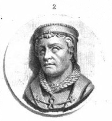 Album du Dauphiné - tome IV, litographie des Dauphins : 2. Guigues II